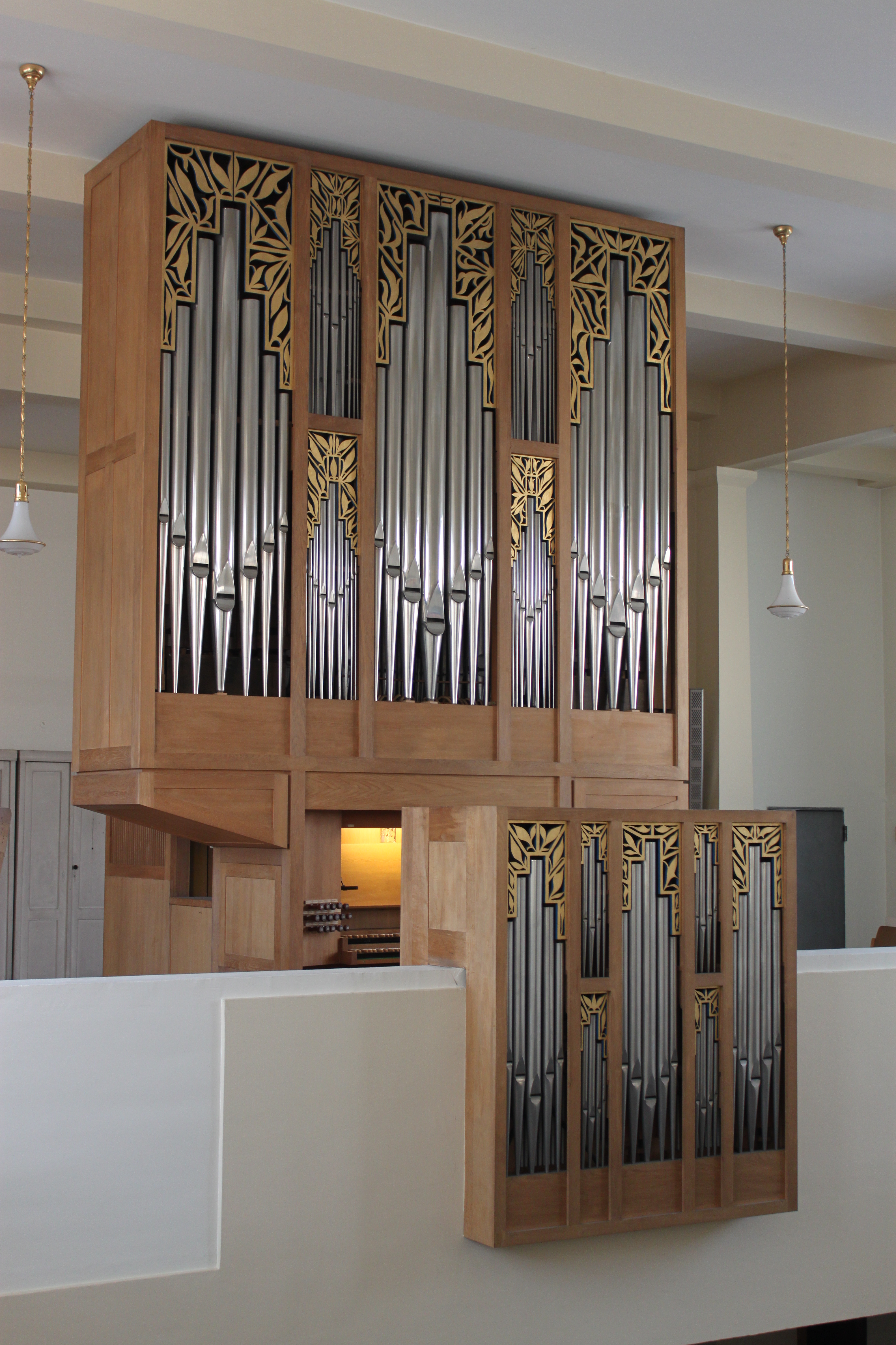 Die Orgel der Schmelzer Pfarrkirche, errichtet 1980-1981 von Herbert Gollini